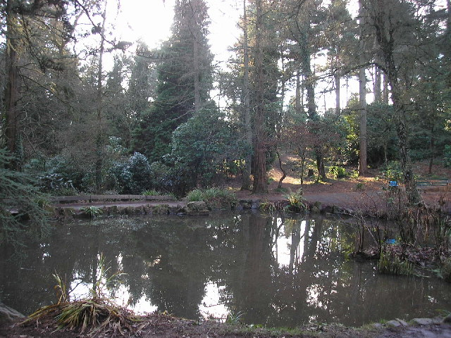 Parc Cefn Onn, Lisvane